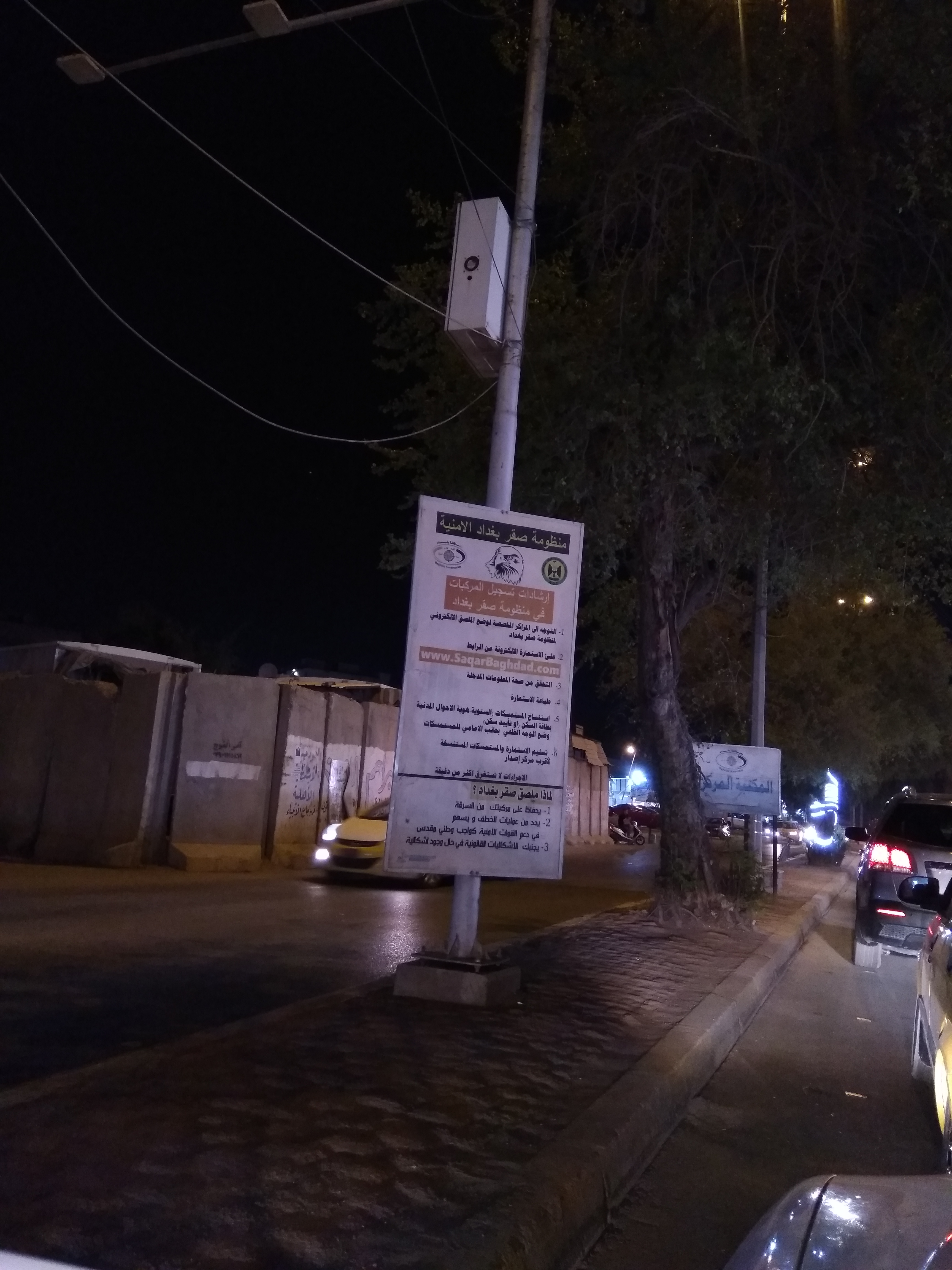 Saqr Baghdad - منظومة صقر بغداد